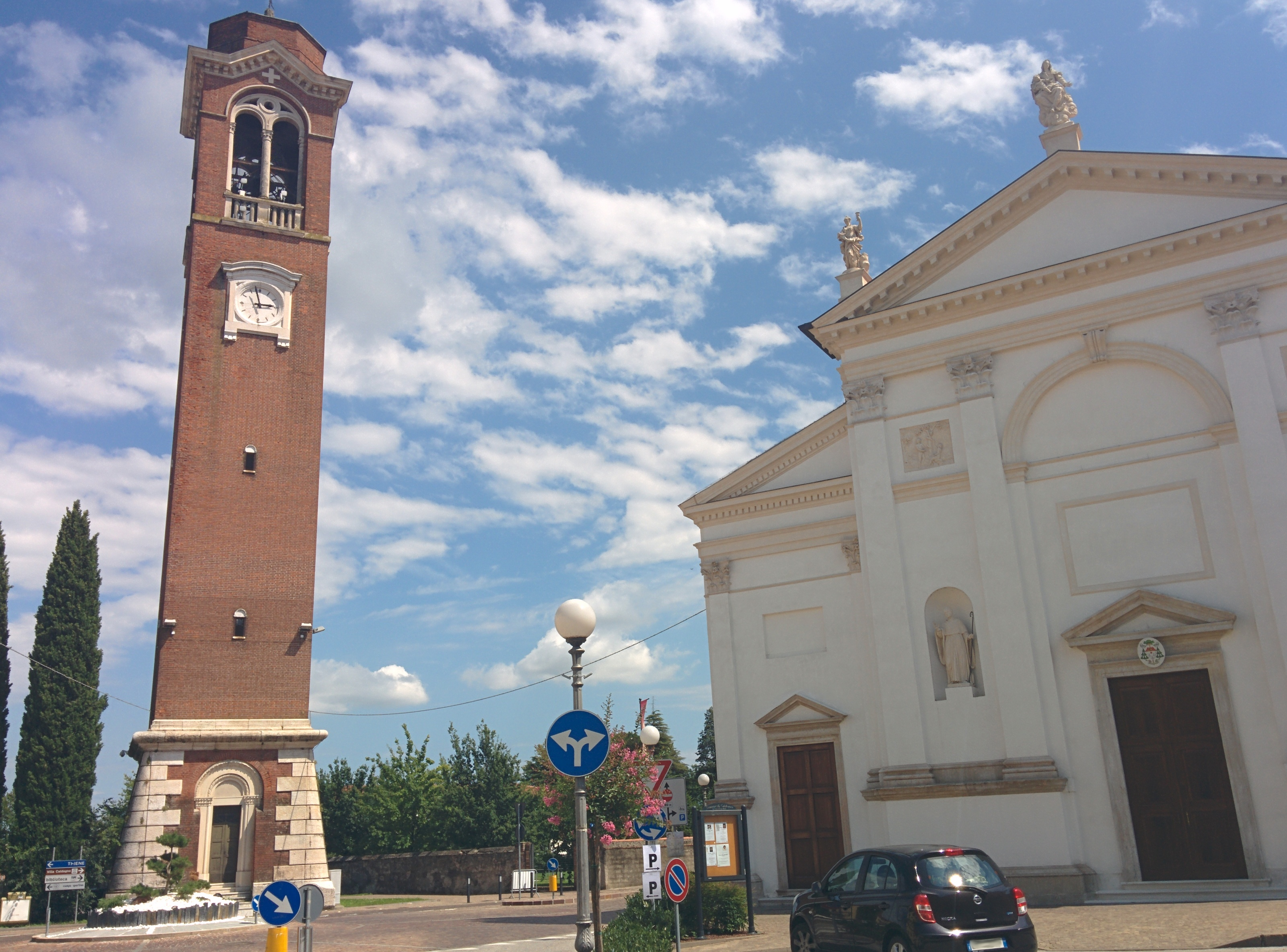 Campanile e facciata della chiesa parrocchiale di Caldogno, in provincia di Vicenza.